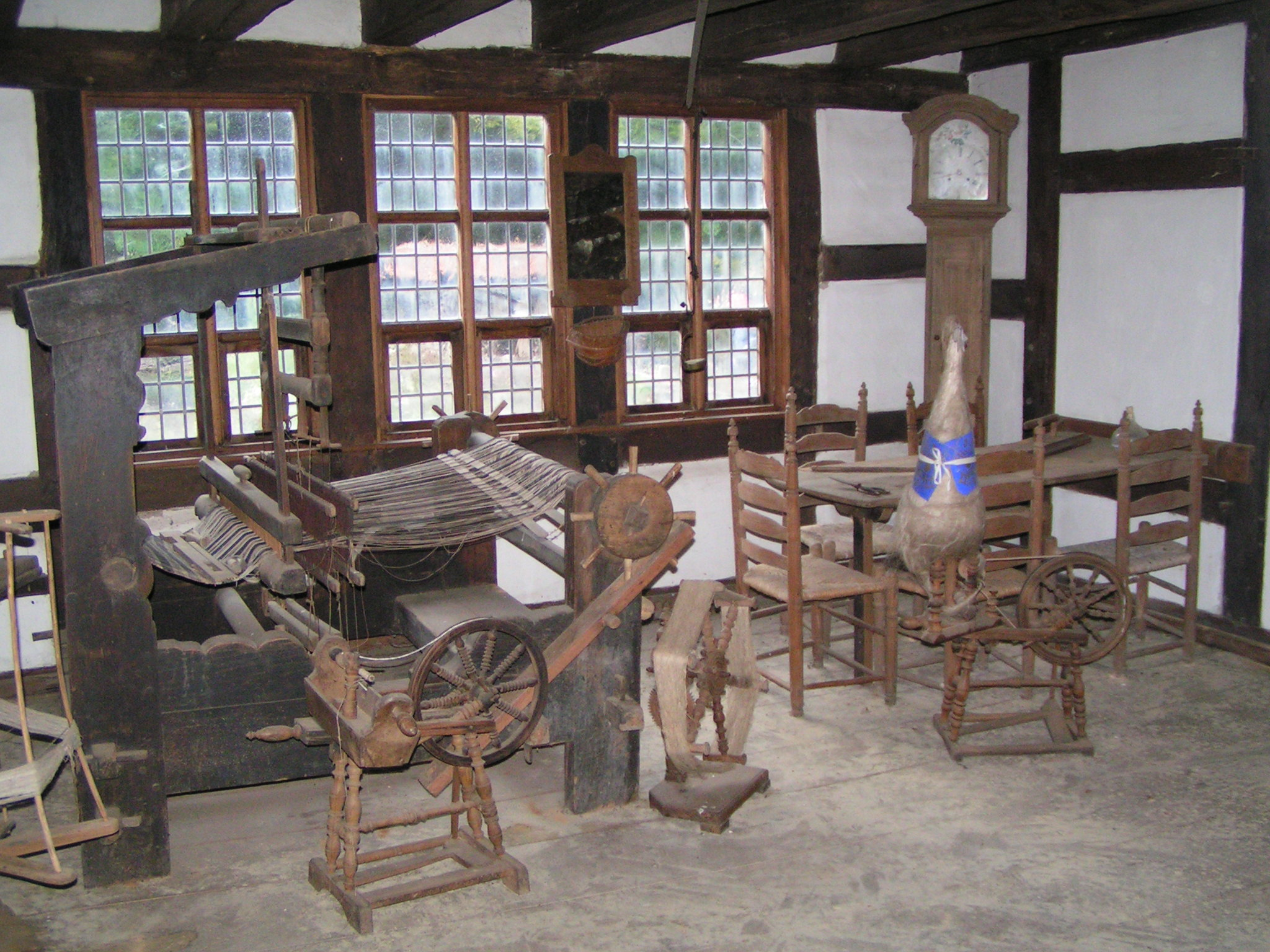 Museumshof Rahden - Inneneinrichtung eines historischen Bauernhofs